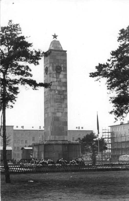 Eisenhüttenstadt, Sowjetisches Ehrenmal In der ersten sozialistischen Stadt der Deutschen Demokratischen Republik In Fürstenberg an der Oder entsteht eine neue Wohnstadt für die Arbeiter des Eisenhüttenkombinats Ost. Für die schnellere Errichtung hat das Ministerium für Aufbau eine kleine neuer Massnahmen getroffen, nachdem die Werktätigen auf einer Produktionsbesprechung scharfe Kritik an dem langsamen Aufbau der Wohnstadt übten. Der neue Sonderbeauftragte, Koll. Ehlers , erklärte, dass es sein Ziel sei, in enger Zusammenarbeit mit den Bauarbeitern und der Technischen Intelligenz die im Plan für 1952 vorgesehenen 903 Wohnungen trotz der vorhandenen Schwierigkeiten und Planrückstände bis Ende des Jahres fertigzustellen. - Eine zweite Hauptaufgabe nannte Koll. Ehlers die Überwindung des stockenden Materialtransports für die Bauarbeiten. UBz: Das sowjetische Ehrenmal in der Wohnstadt. Zentralbild-Sturm 839.AV Berlin V 8 21.11.52 Str-Zb